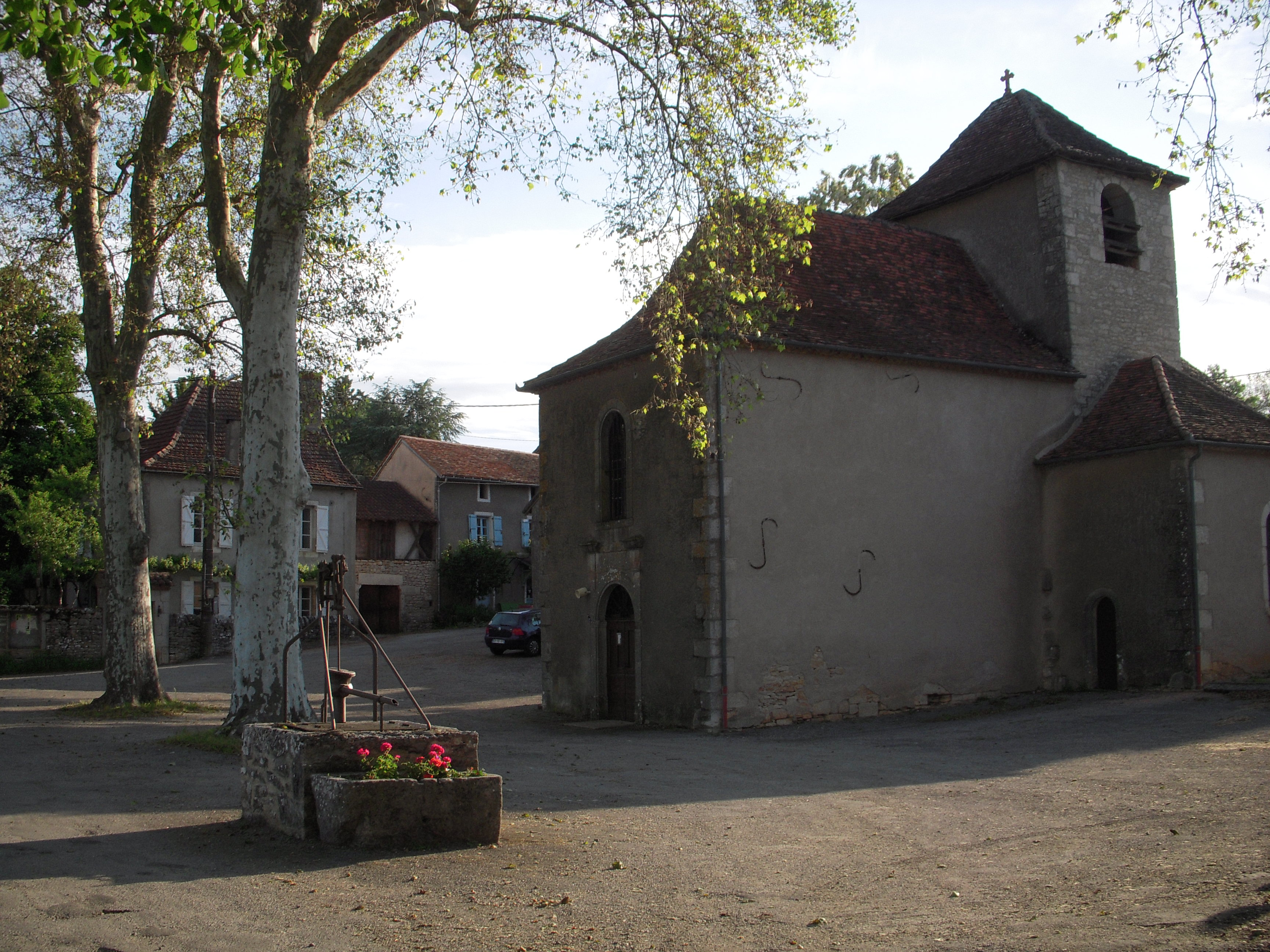 Gréalou - Place de l'église